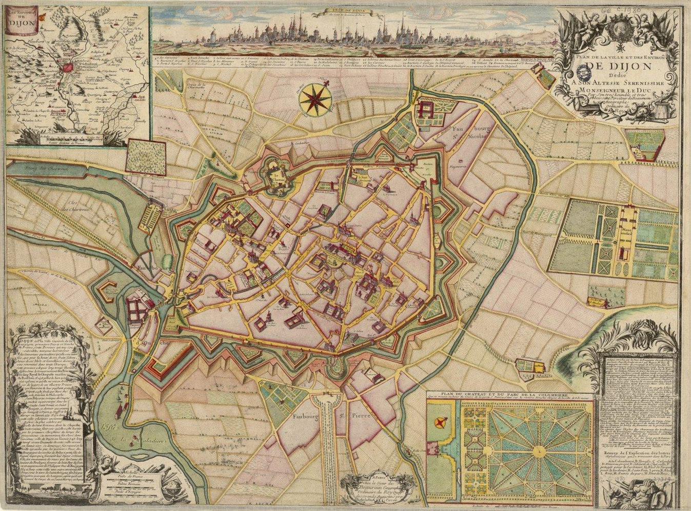 Plan de la Ville et des Environs de Dijon (1730)